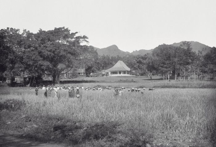 foto. Gezicht op controleurswoning te Boea in de Padangsche Bovenlanden